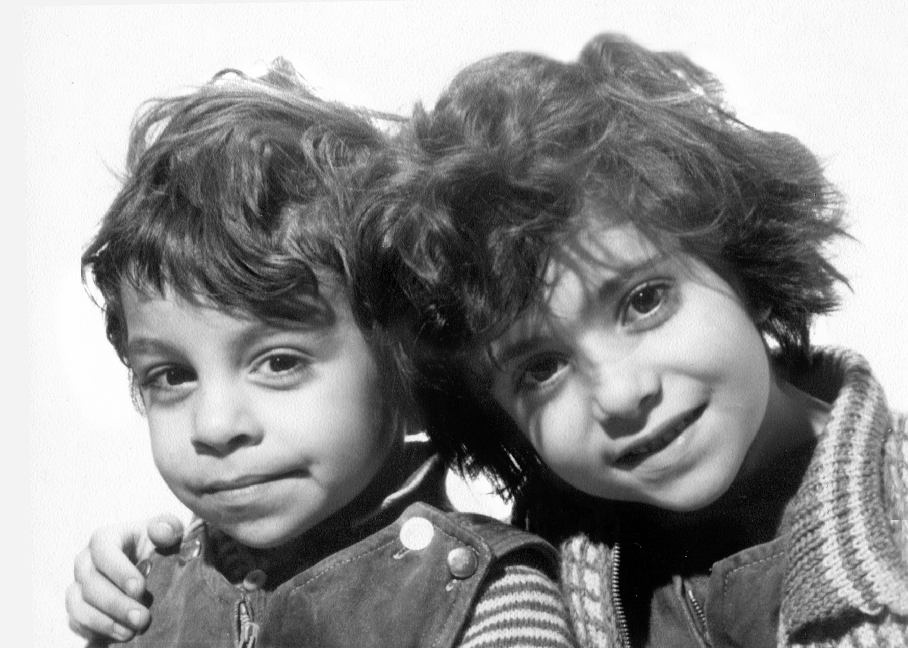 Retrato de Carlos Luis Savelli y Ana Maria Savelli, por Luis Victorino Savelli en 1975